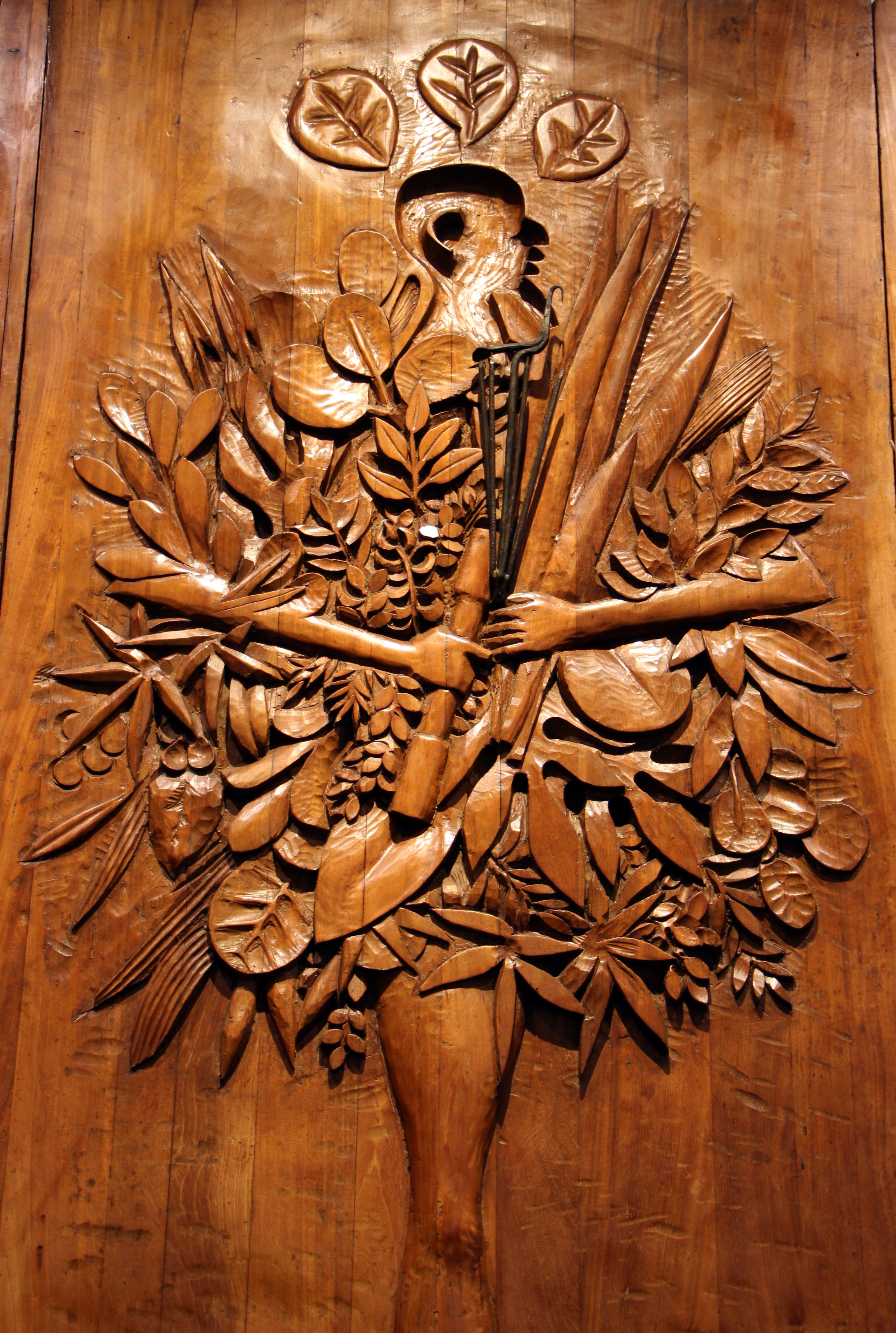 Candomblé nel Museu Afro-Brasileiro, Salvador